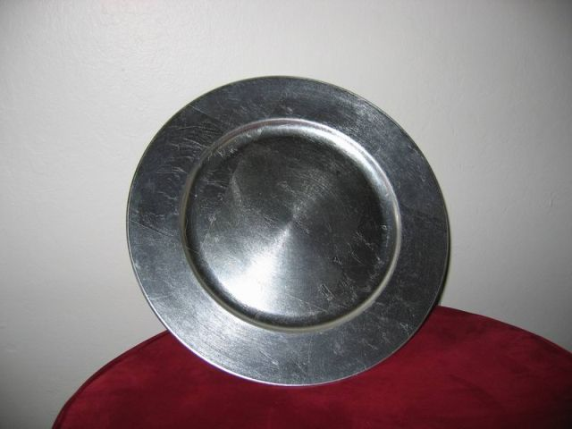 Metal plate